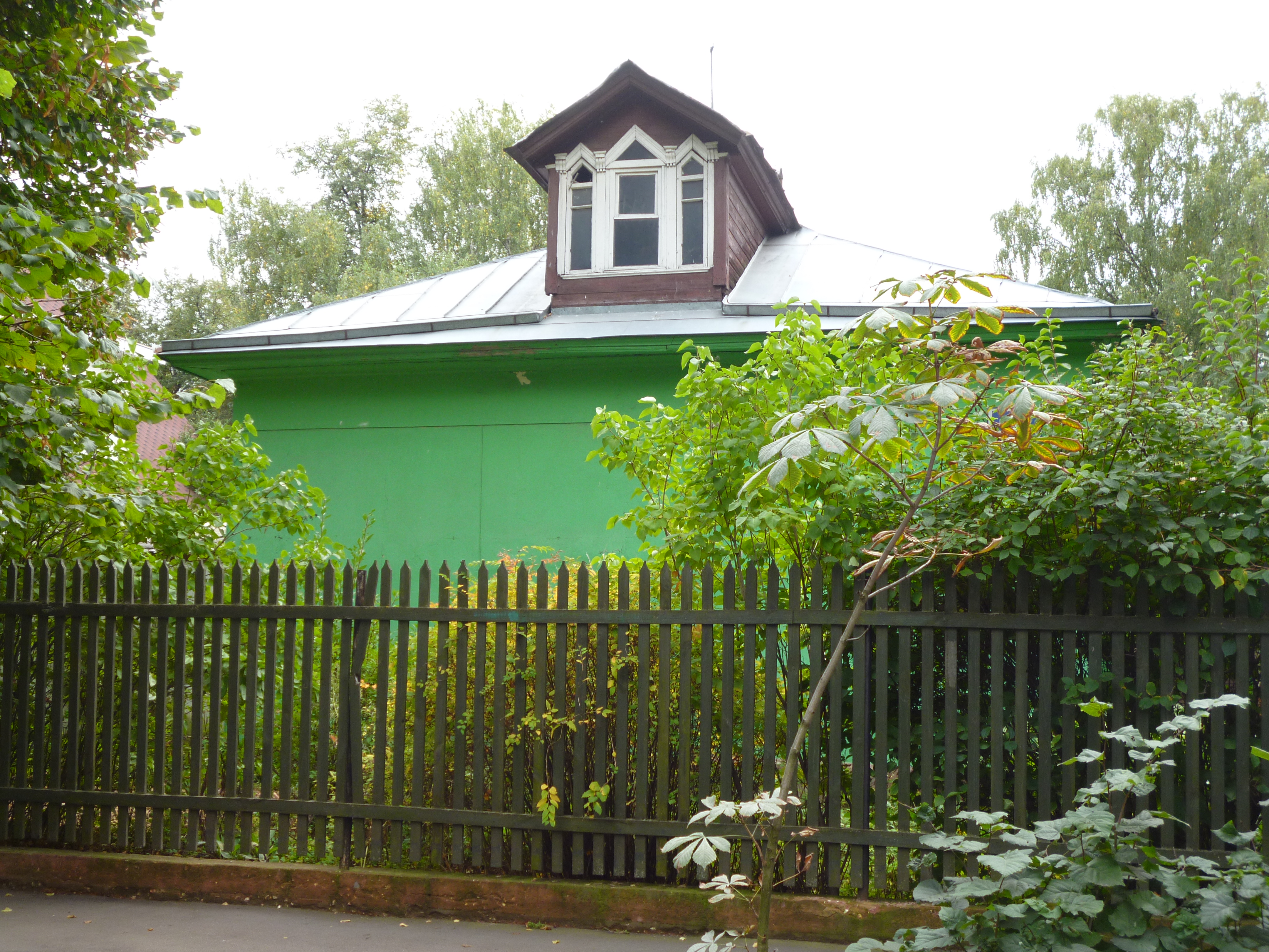 Жилой дом: Сурикова ул., дом 15, Сокол, Северный округ, Москва